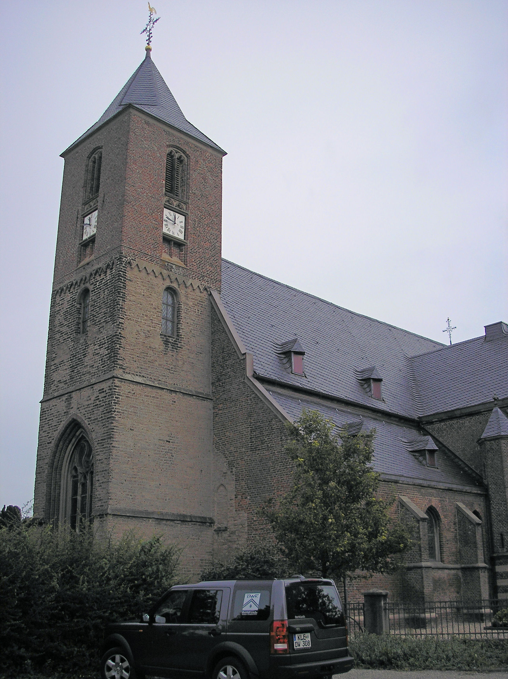 Katholische Kirche St. Mariae Himmelfahrt in Keeken, Stadt Kleve